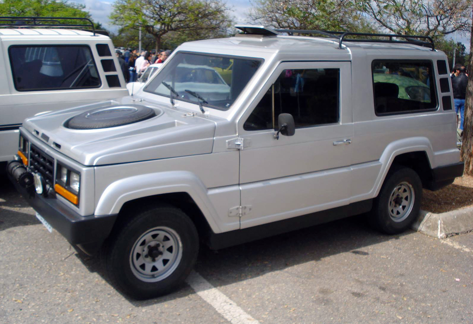 Gurgel Carajás at a Gurgel Meet in Sorocaba, Brazil